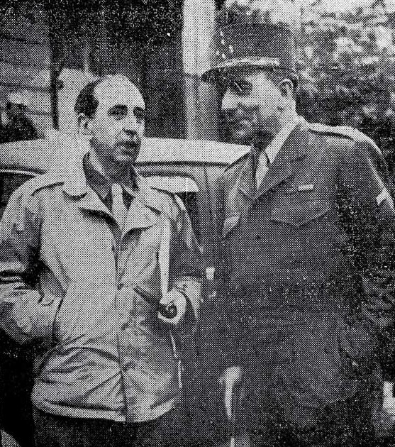 Fotografía del escritor chileno Vicente Huidobro conversando con el general Jean de Lattre de Tassigny. Publicado en el Diario La Razón (Montevideo) "He aqui, una nota grafica captada a fines de marzo, a nuestro corresponsal en el teatro de la guerra europea, el renombrado poeta Vicente Huidobro, en momentos en que conversa con el general en jefe del ejército francés, general de Lattre de Tassigny, luego de la invasión aliada por el lado de Alsacia, preámbulo de las luchas posteriores que habrían de tener como meta la total conquista del territorio alemán".